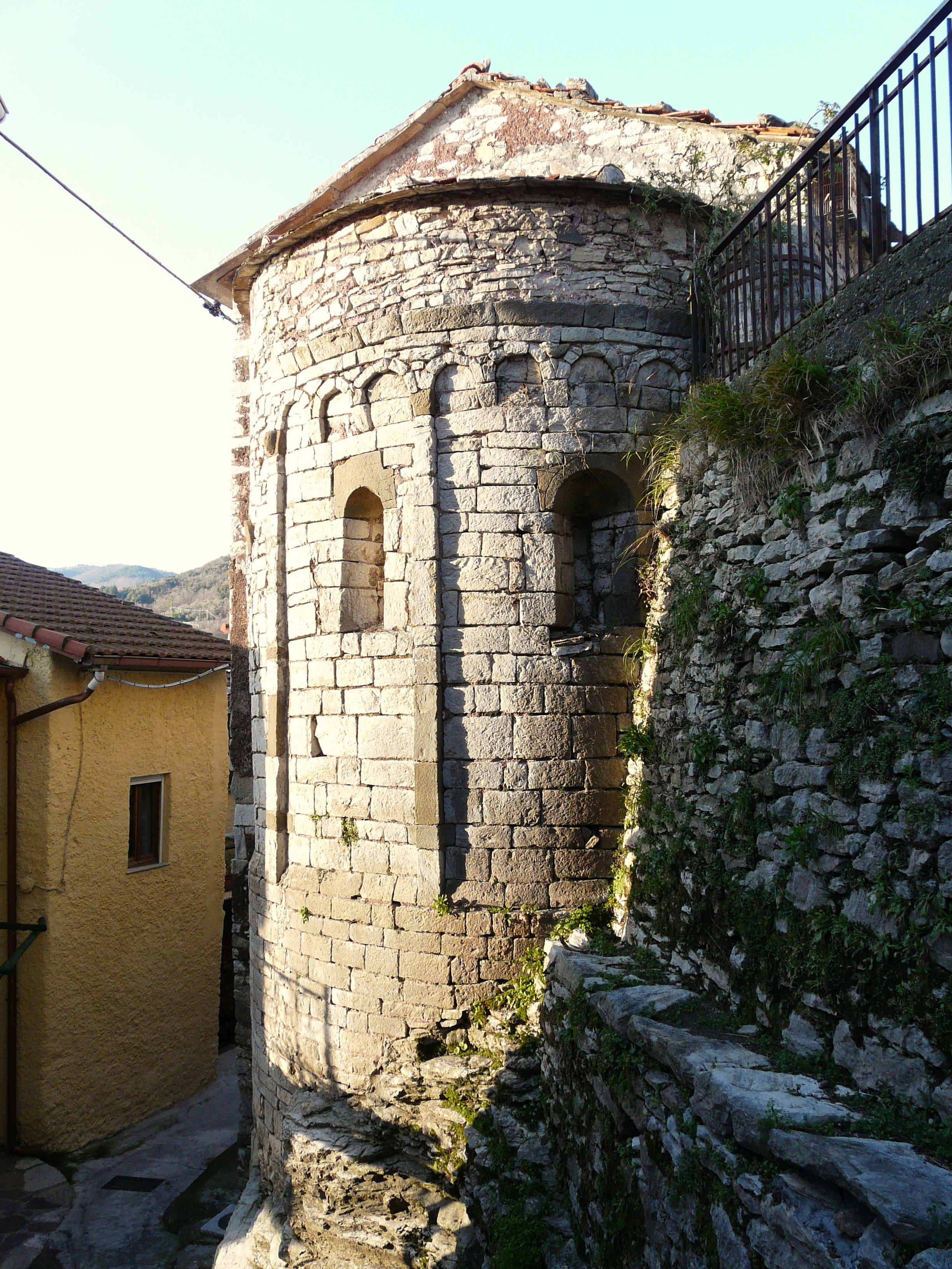 Chiesa di San Bartolomeo, Ponzò, Riccò del Golfo di Spezia, Liguria, Italia